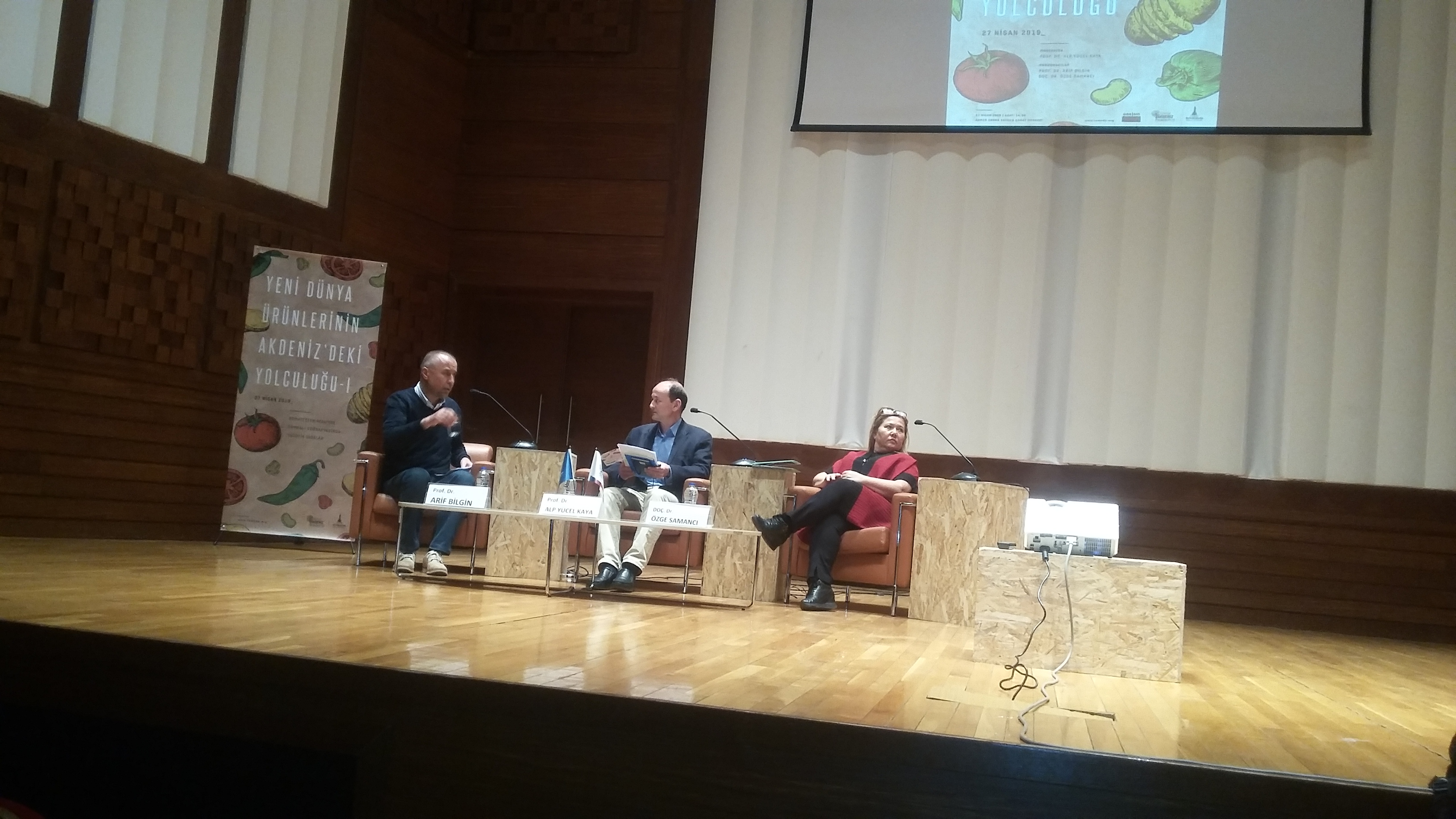 Akdeniz Akademisi tarafından düzenlenen Yeni Dünya Ürünlerinin Akdeniz'deki Yolculuğu I toplantısında Arif Bilgin, Alp Yücel Kaya ve Özge Samancı.